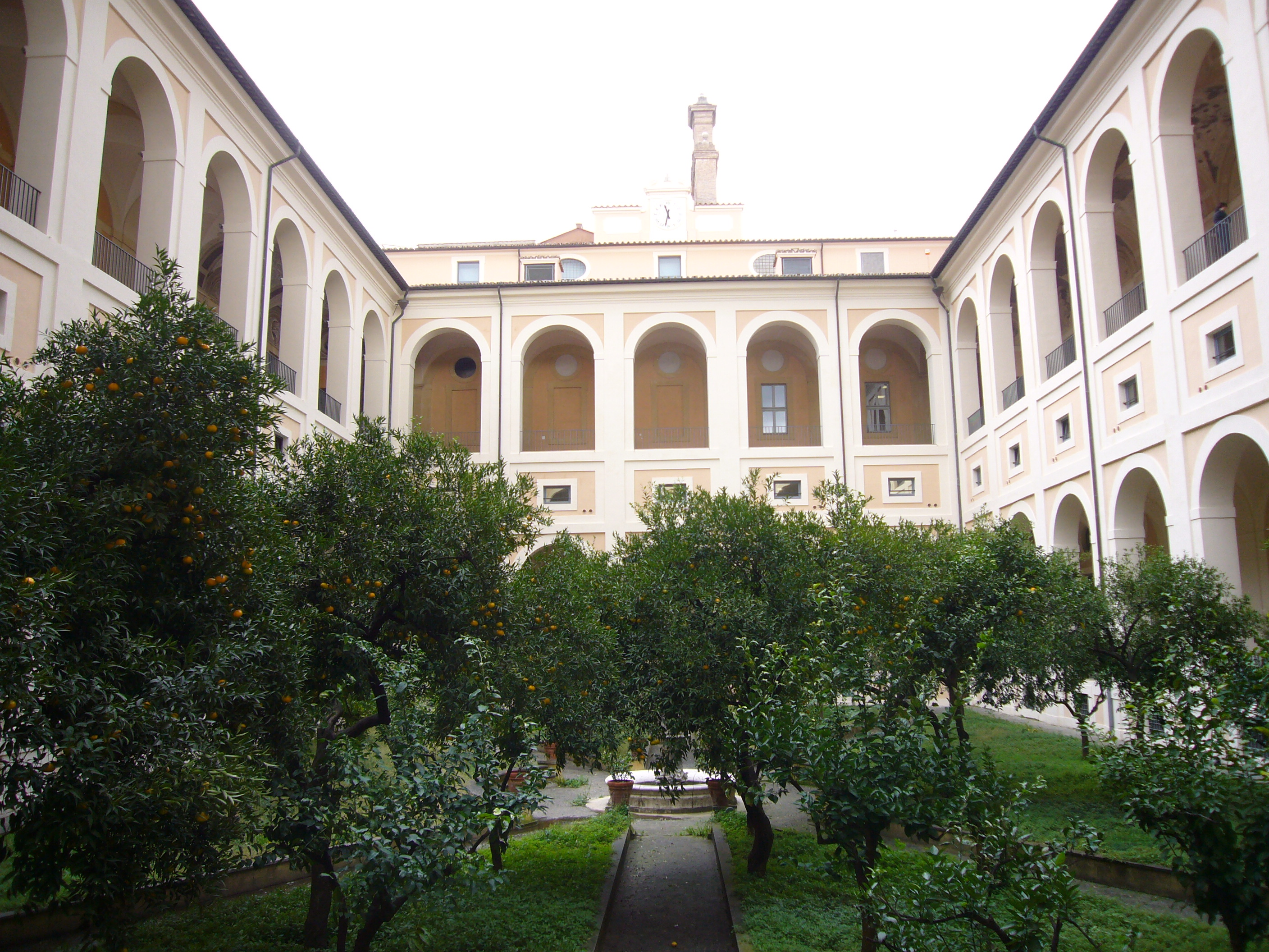 Roma, Istituto San Michele: cortile dei vecchi